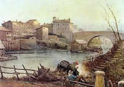 Ponte Cestio ed isola tiberina (rione Ripa)